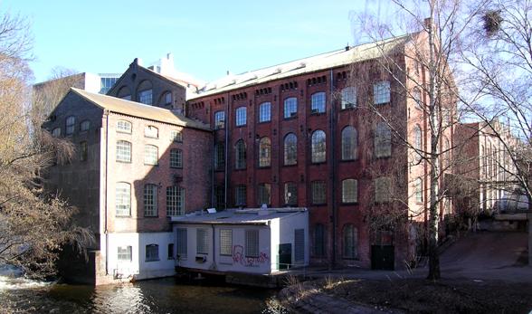 Christiania seilduksfabrikk, Oslo.